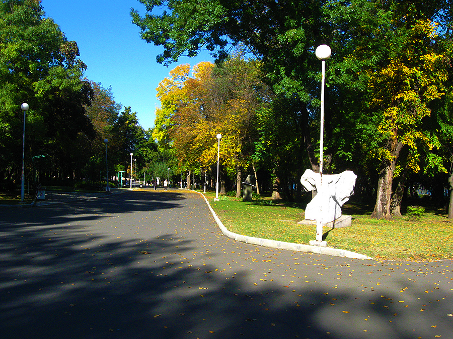 Алея в Морската градина на Бургас